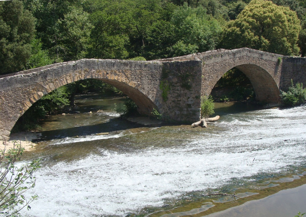 Pont ancien sur le Caramy à Vins-sur-Caramy (Var). L'arche de gauche est en arc surbaissé (probablement reconstruite), celle de droite en plein cintre. .